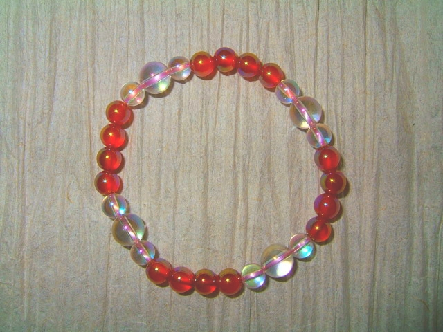 ローズオーラのブレスレット